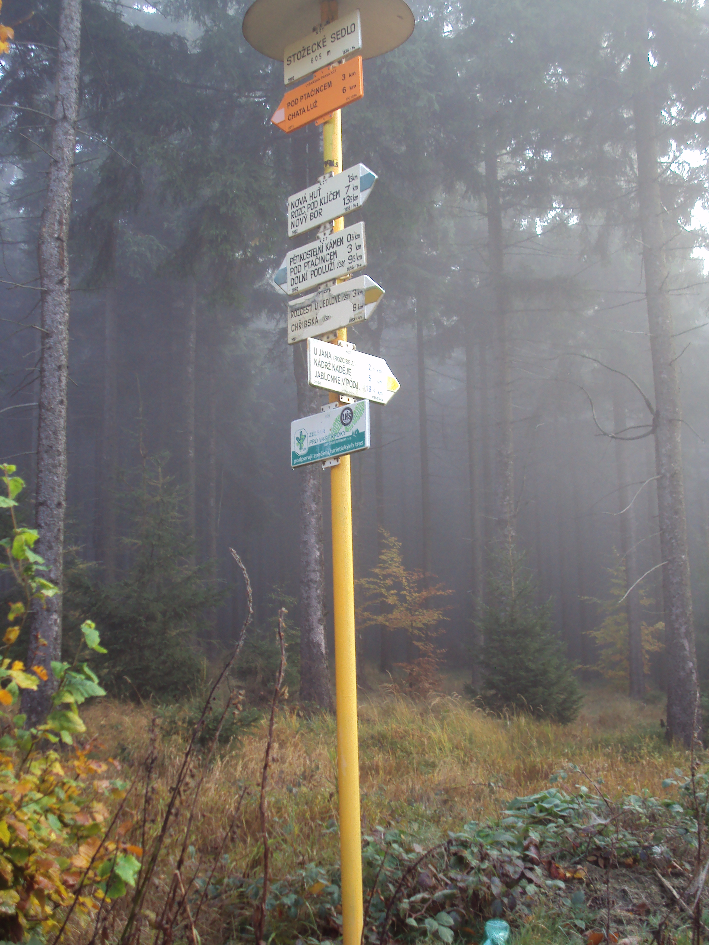 Rozcestník východně od silníce I/9 a Stožeckého sedla, katastr Dolní Podluží